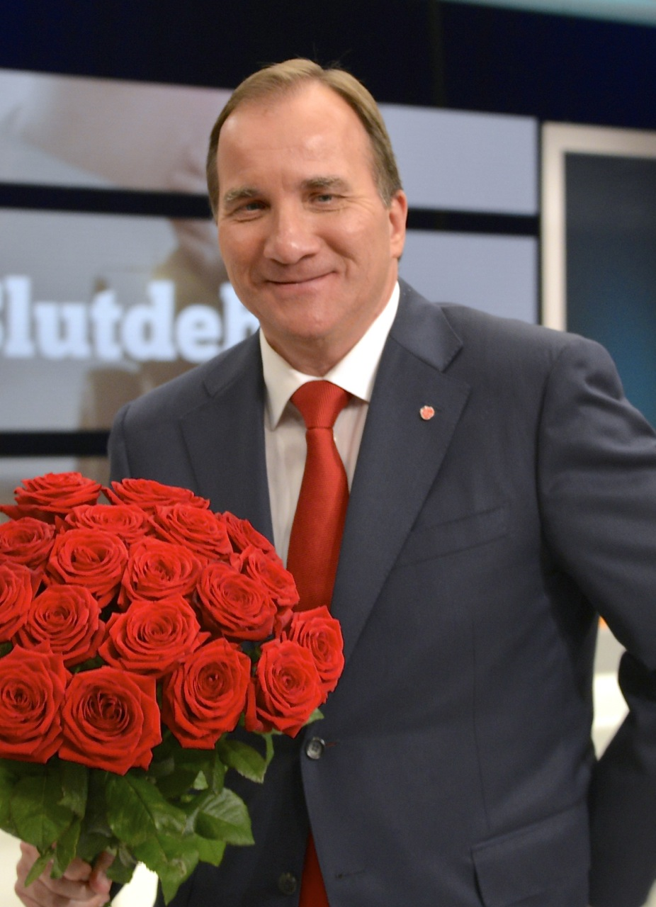 Stefan Löfven efter slutdebatten i SVT 2014 den 12 september 2014.